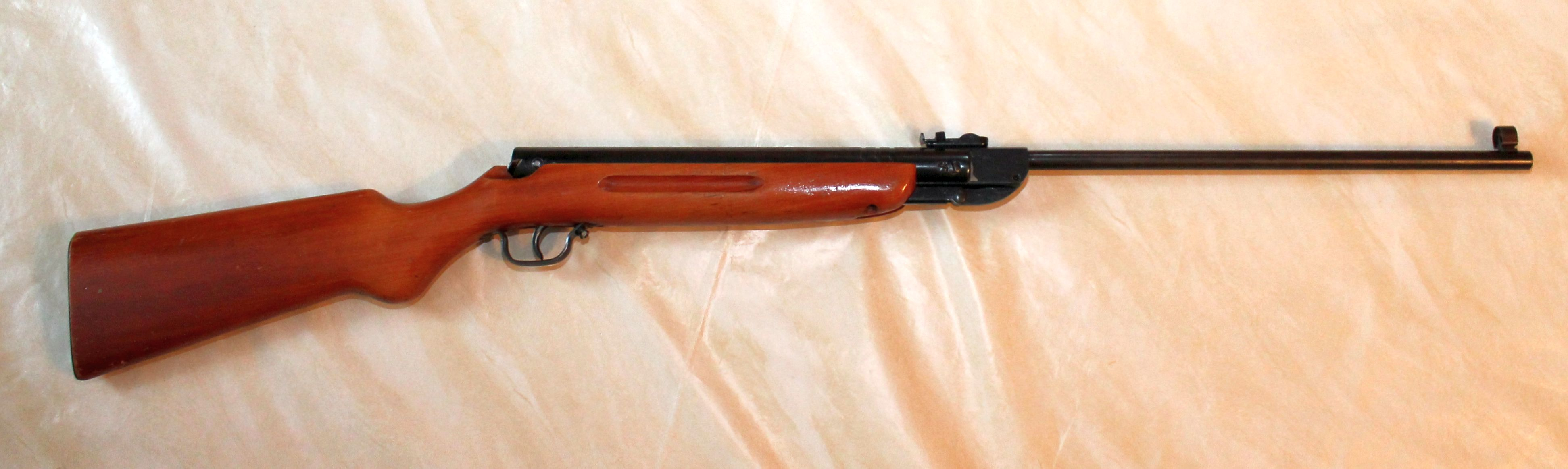 Haenel-Luftgewehr III-284 von 1962.